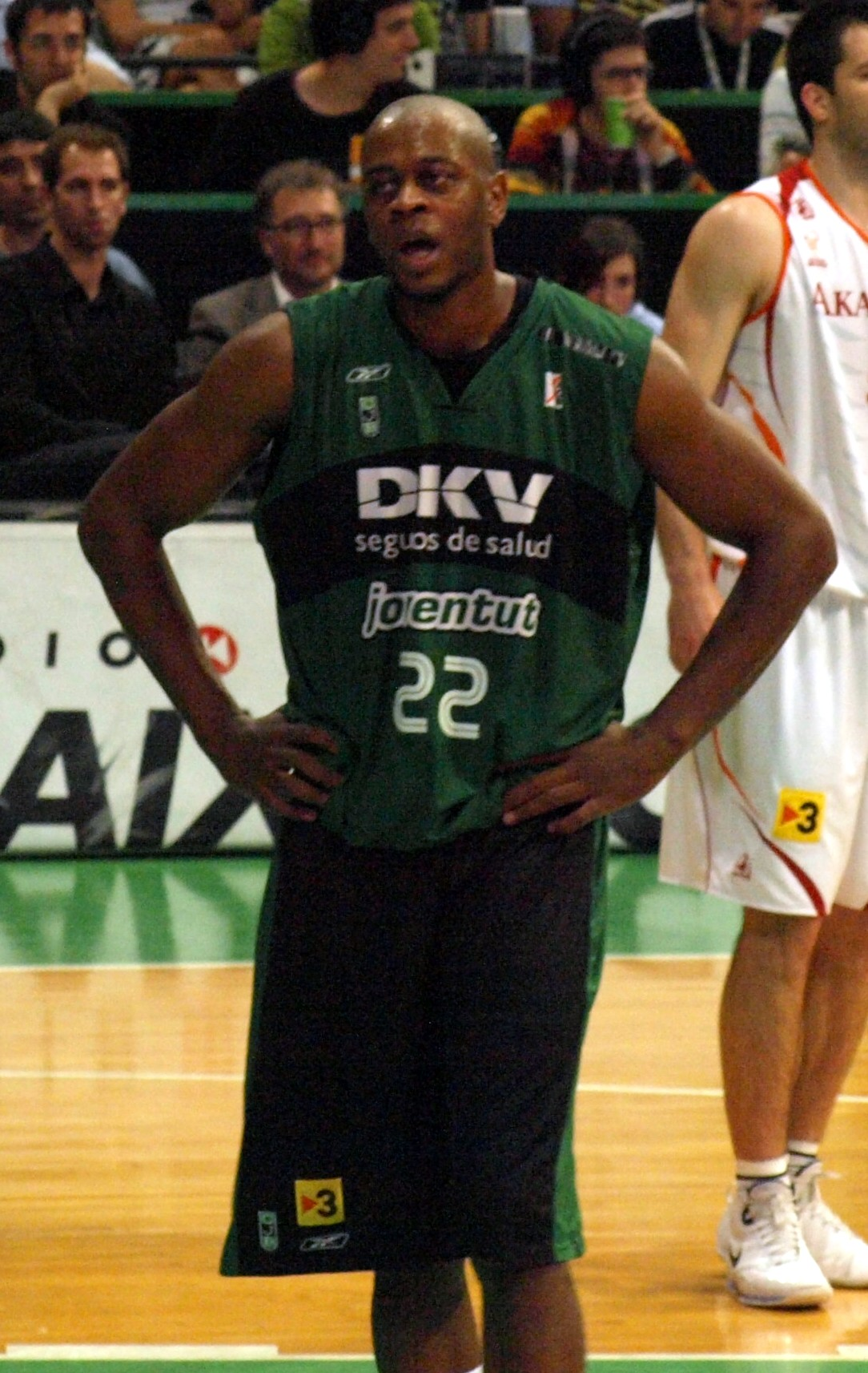 Jérôme Moïso del DKV Joventut